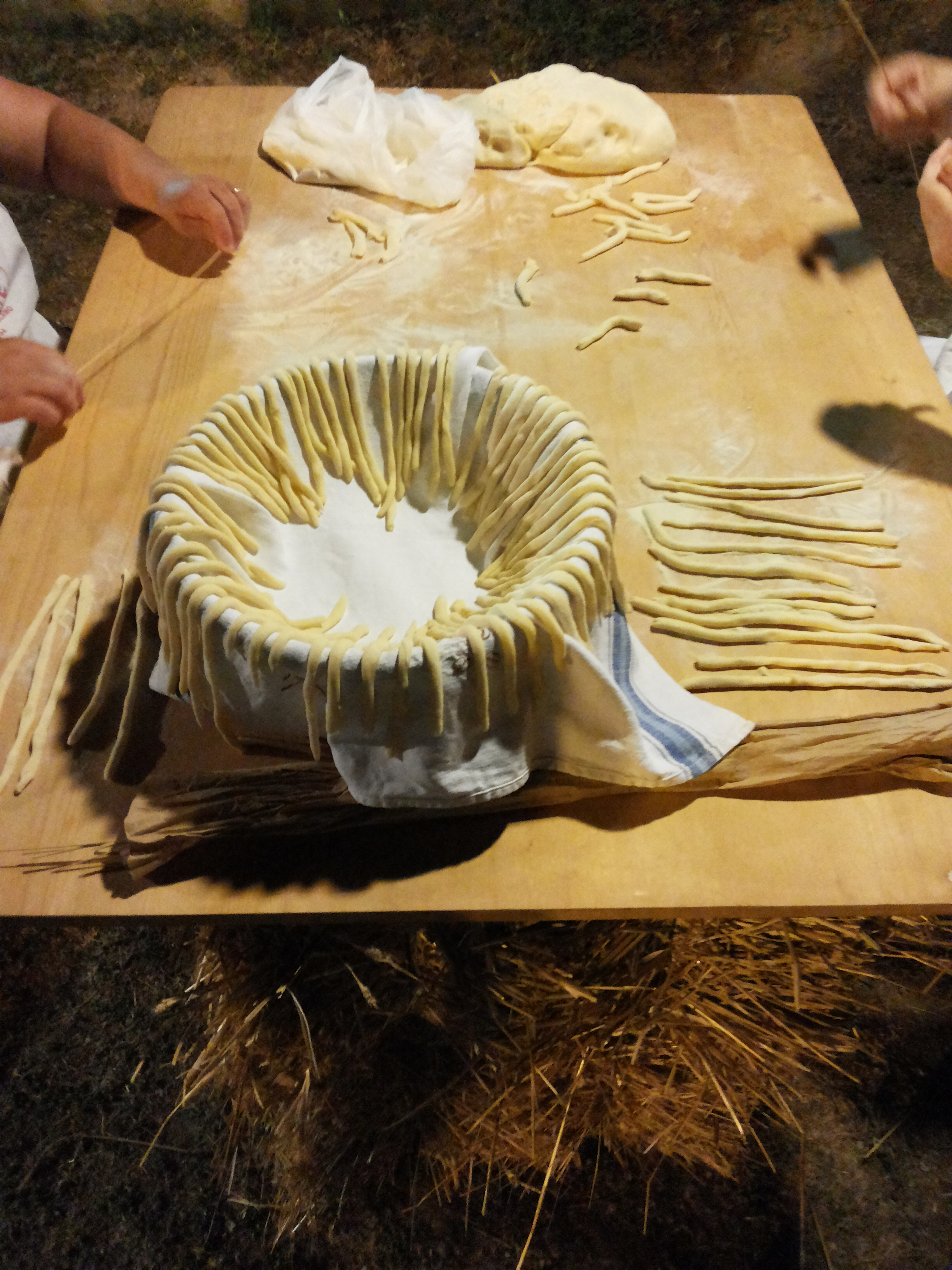 Gnocculi, maccheroni fatti a mano. Ristorante maneggio Lo Sperone, Alcamo